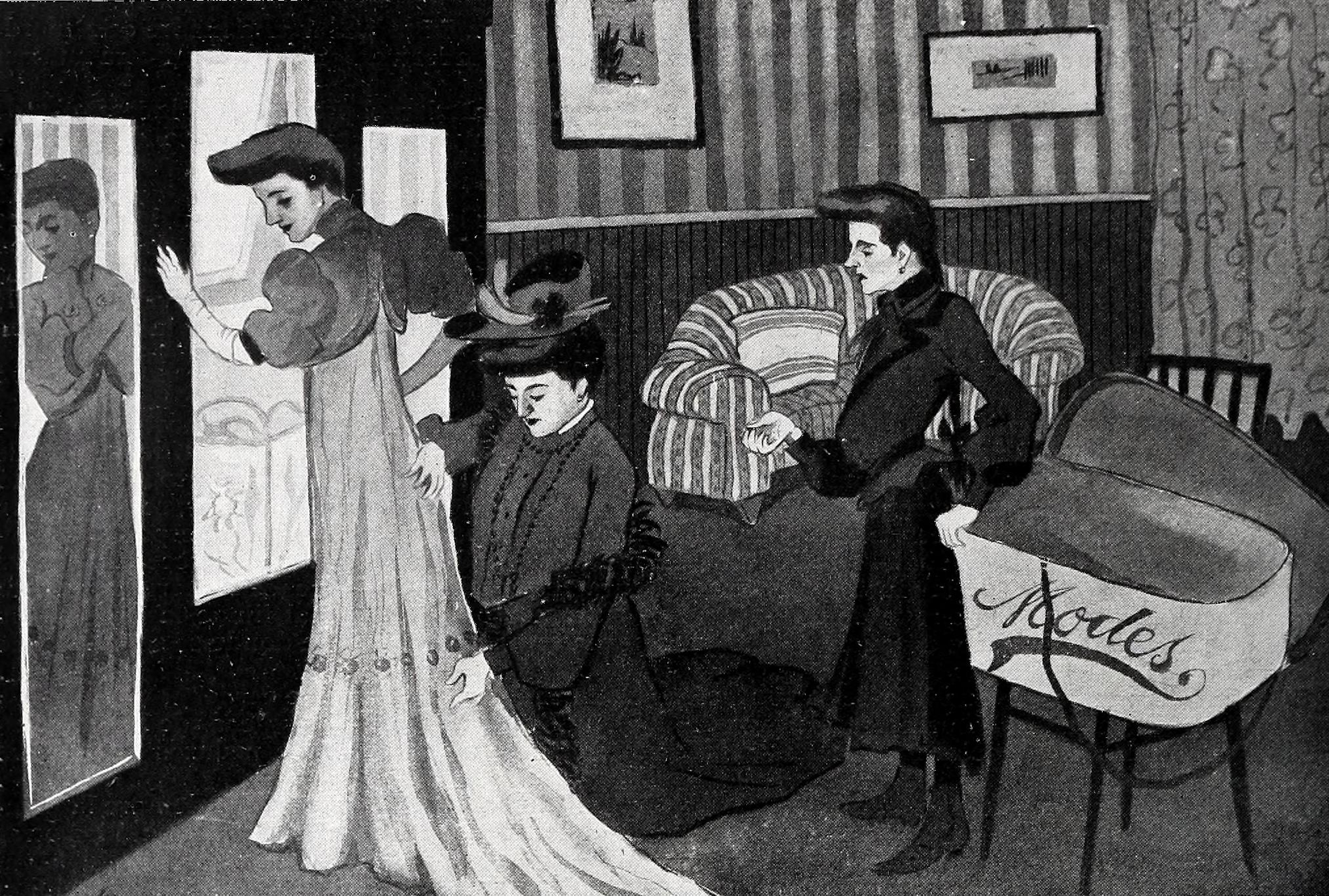 La chica de la modista.